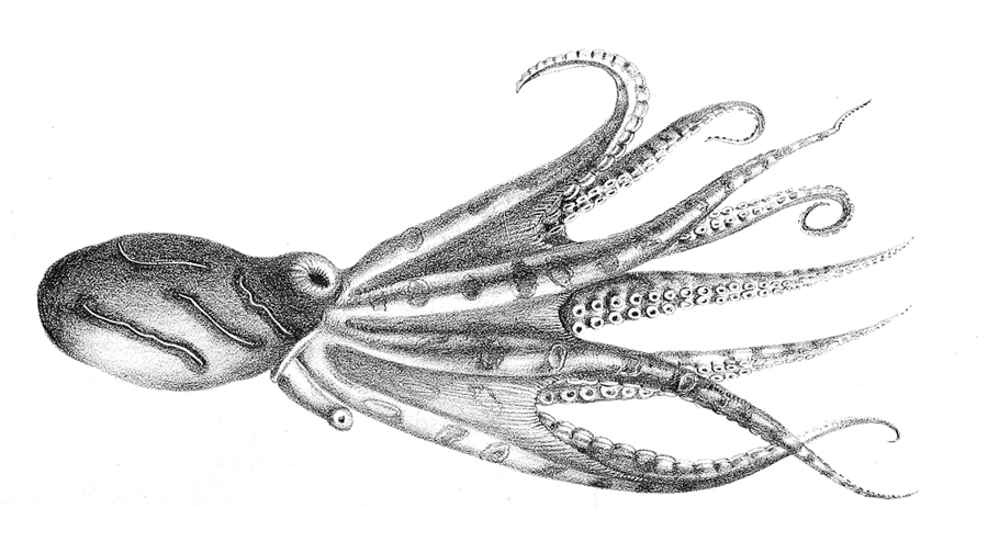 Hapalochlaena fasciata